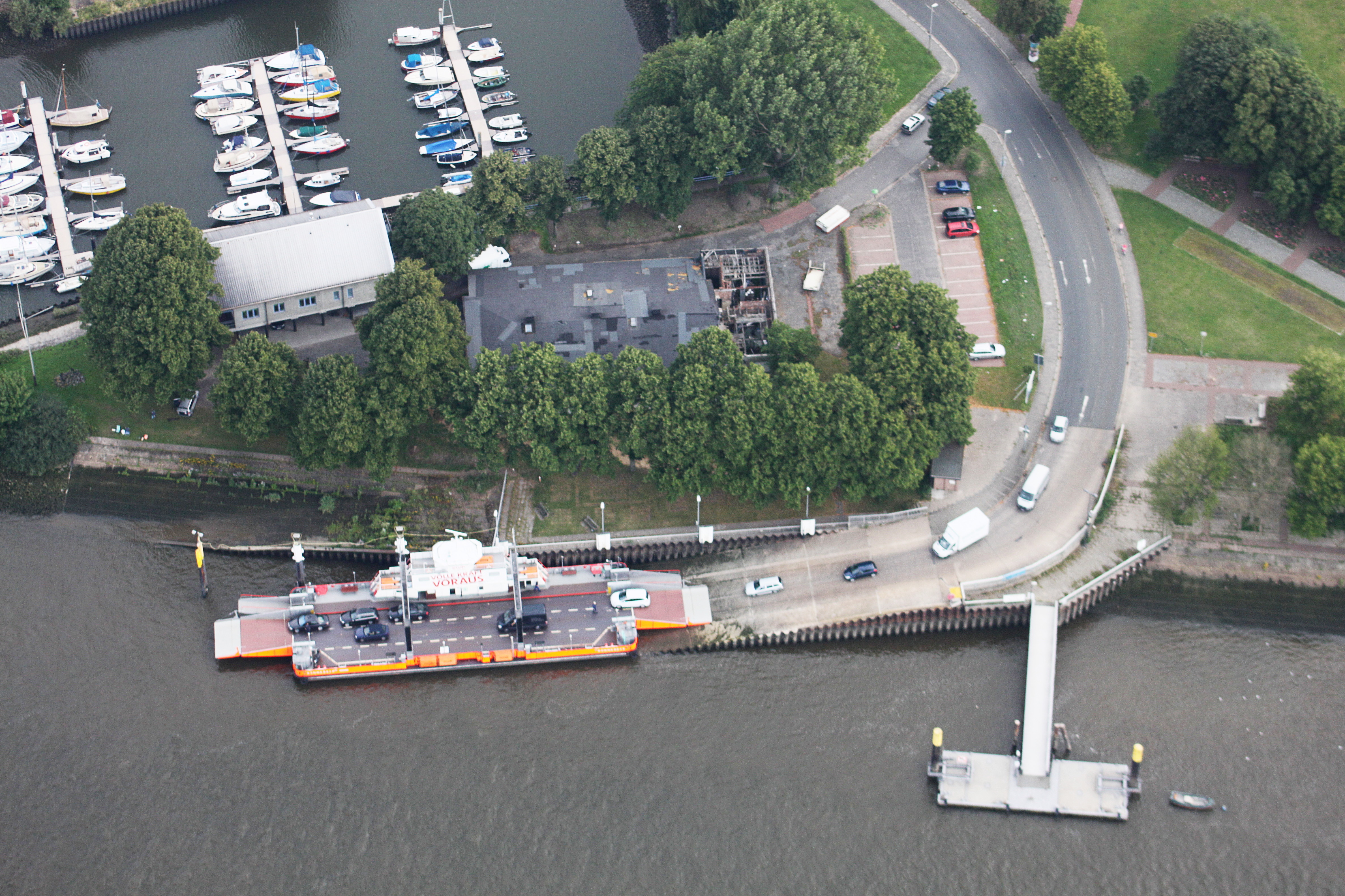 Fähre Blumenthal; Bremen Nord; Hafen Wassersportverein Blumenthal e.V.; Fotoflug Bremen; Flughöhe 500 m; Luftbilder Bremen-Nord: vom U-Boot Bunker Valentin bis Vegesack ; Flug entlang der Weser von West nach Ost, über dem linken Weserufer, mit Blickrichtung zum rechten Weserufer ; Anleger Blumenthal der Fähre Blumenthal-Motzen